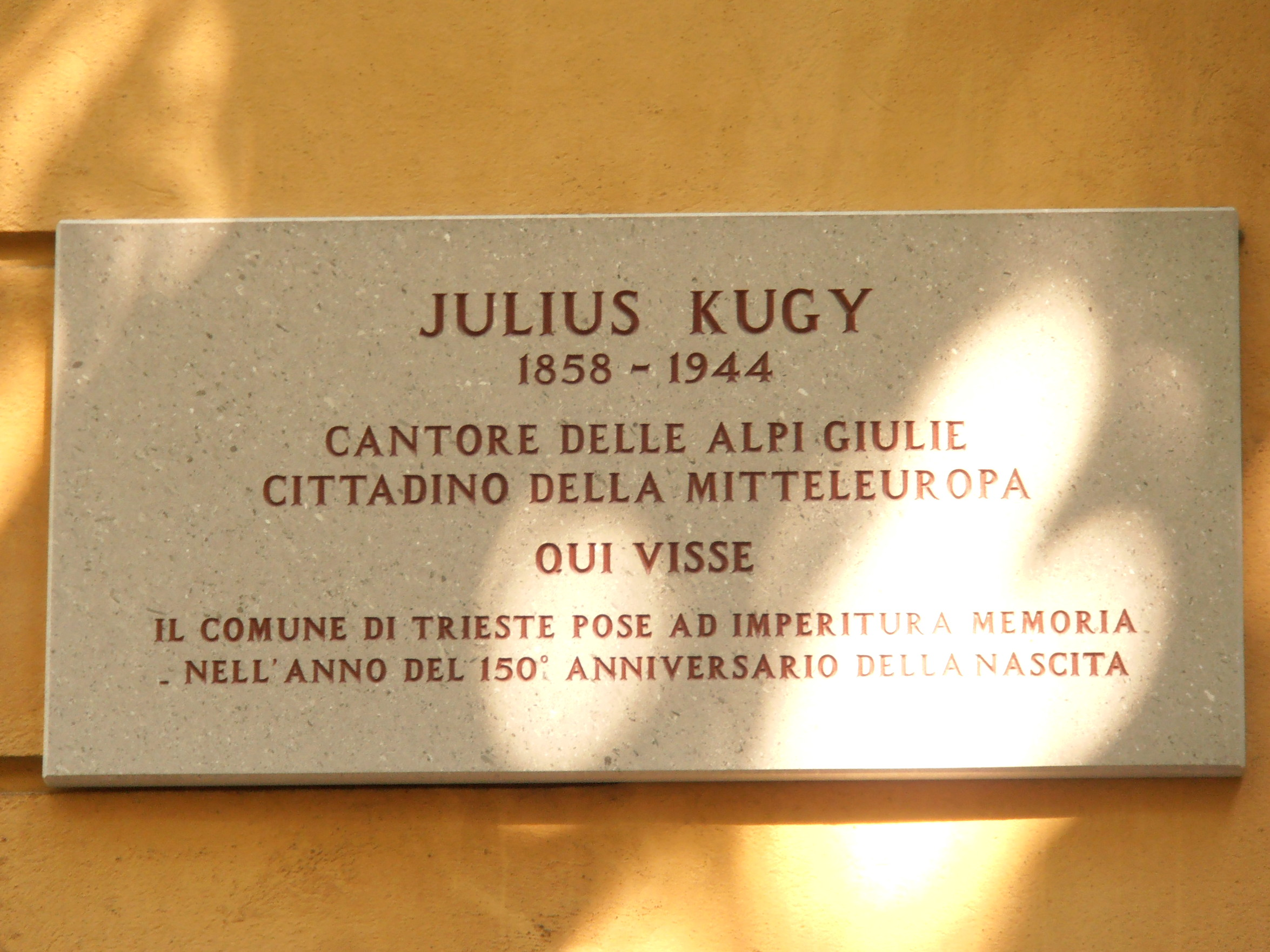 Italy - Trieste - Via Sant'Anastasio 20 - Targa a Julius Kugy sulla casa dove passò l'ultimo periodo della sua vita